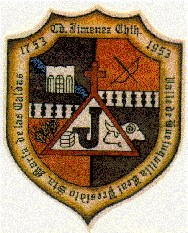 Escudo de Armas de Ciudad Jimenez, Chihuahua, Mexico